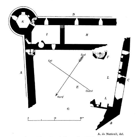 Plan du château de Coëtfrec : Illustration de l'article d'Alfred de La Barre de Nanteuil pour le Bulletin monumental, T. 76, 1912, en face de la page 494.